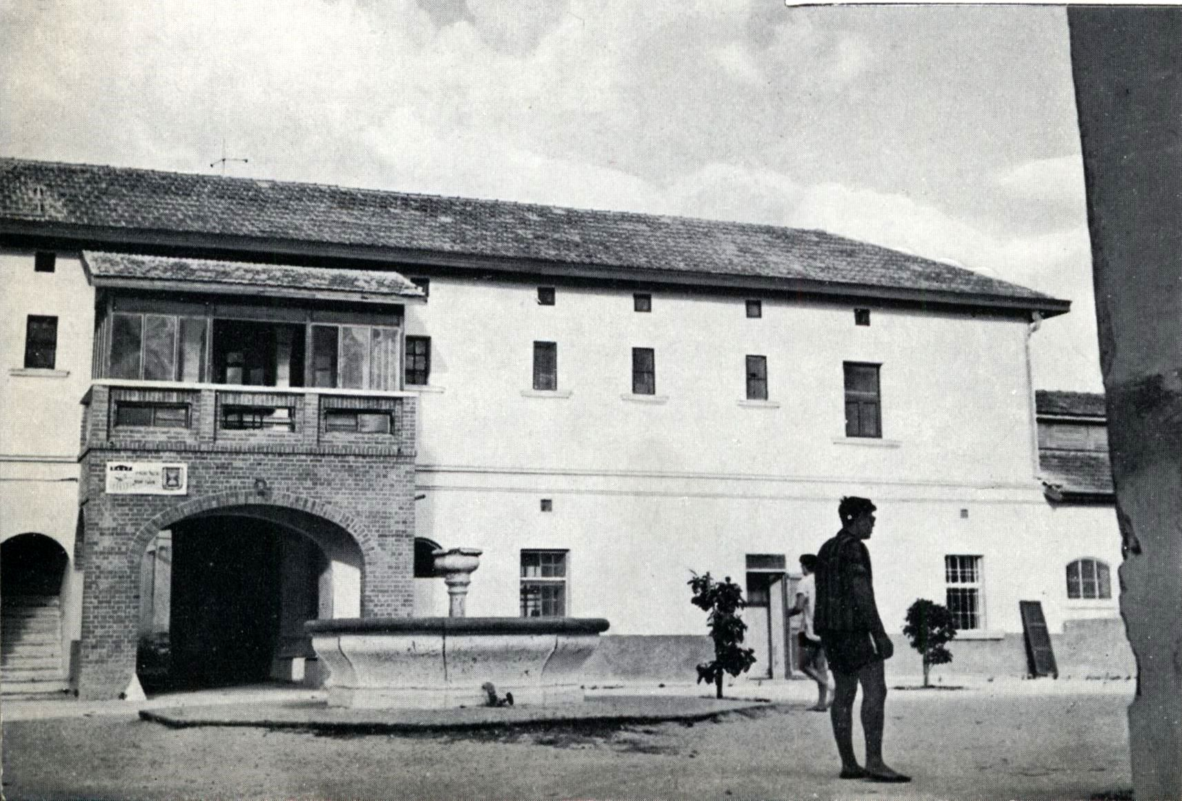 בית הספר החקלאי ע"ש כדורי בעכו. בנין מזמן הטורקים ששוקם והותאם לצרכי ביה"ס. 1956